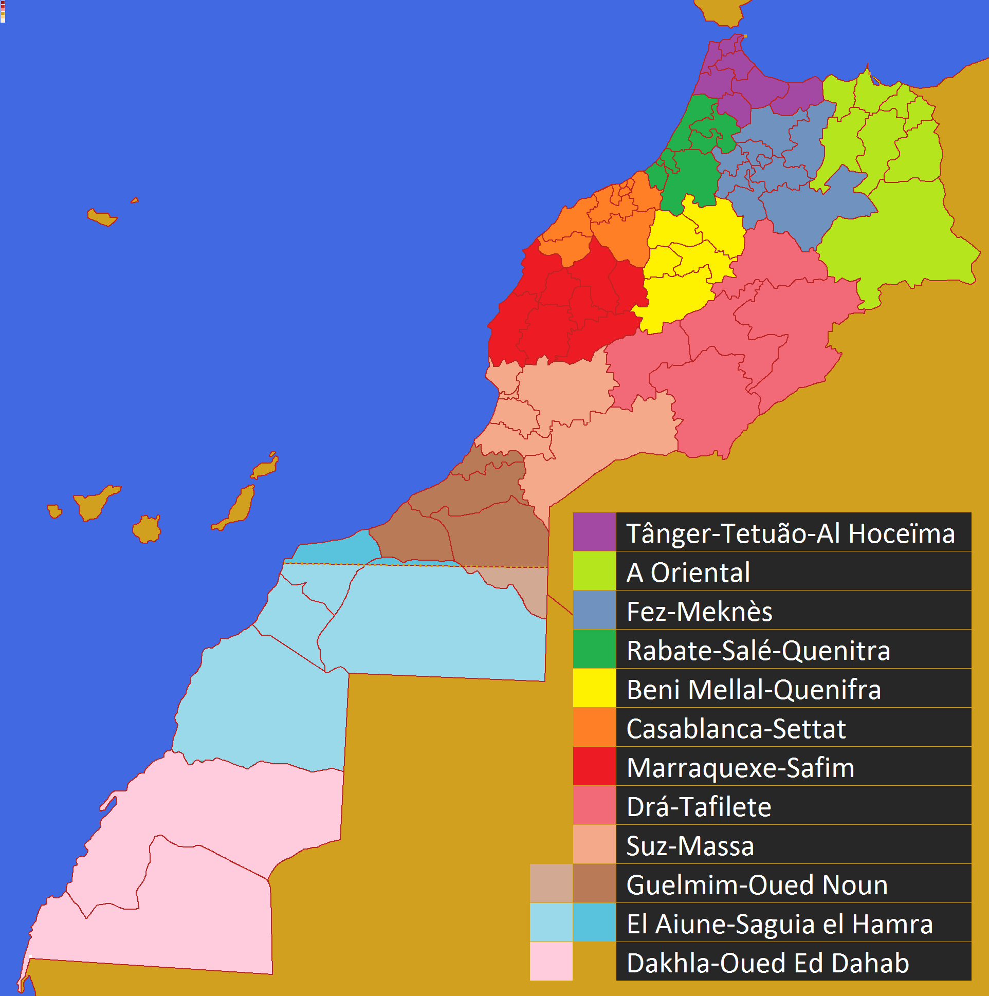 Divisão de Marrocos por Região e por ProvínciaPrefeitura conforme a reforma admistrativa de 2015. Sara Ocidental incluído.II